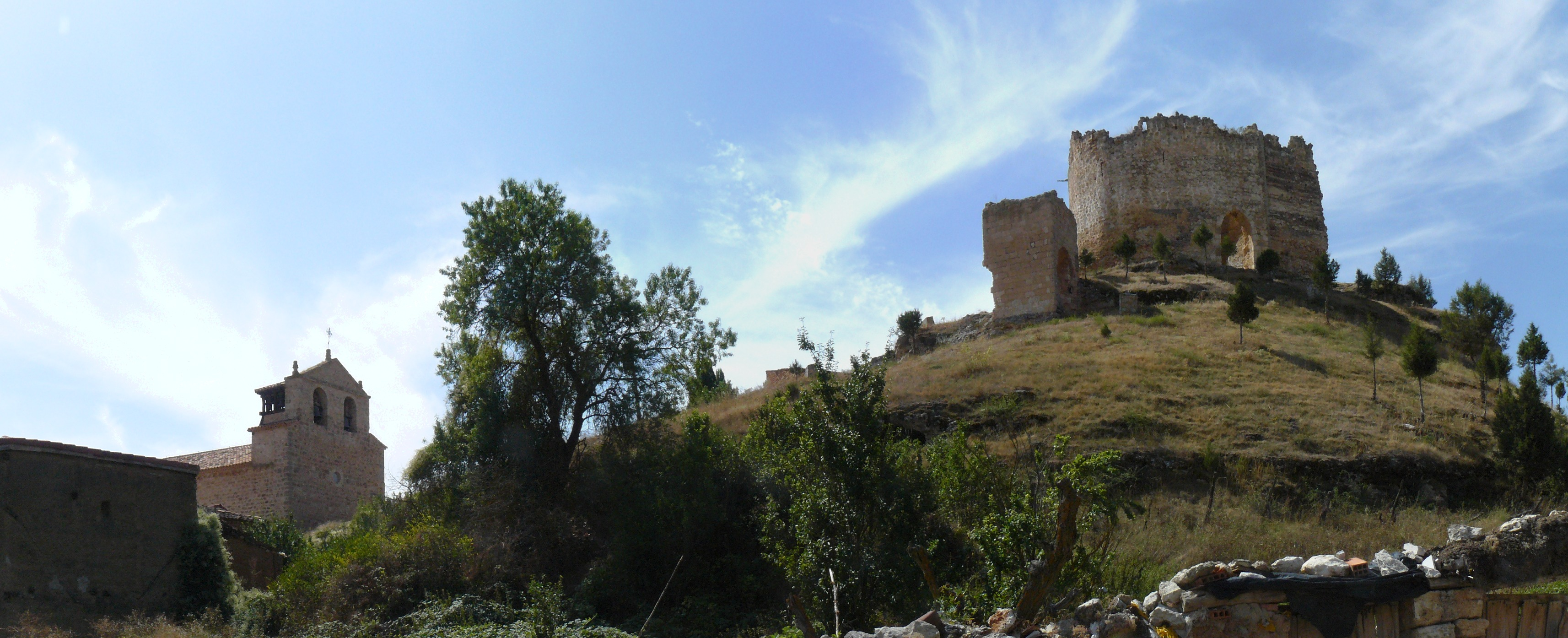 Vista septentrional del castillo de Castillejo de Robledo.